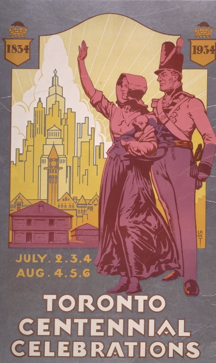 Poster for Toronto's centennial celebrations (Toronto, Canada)